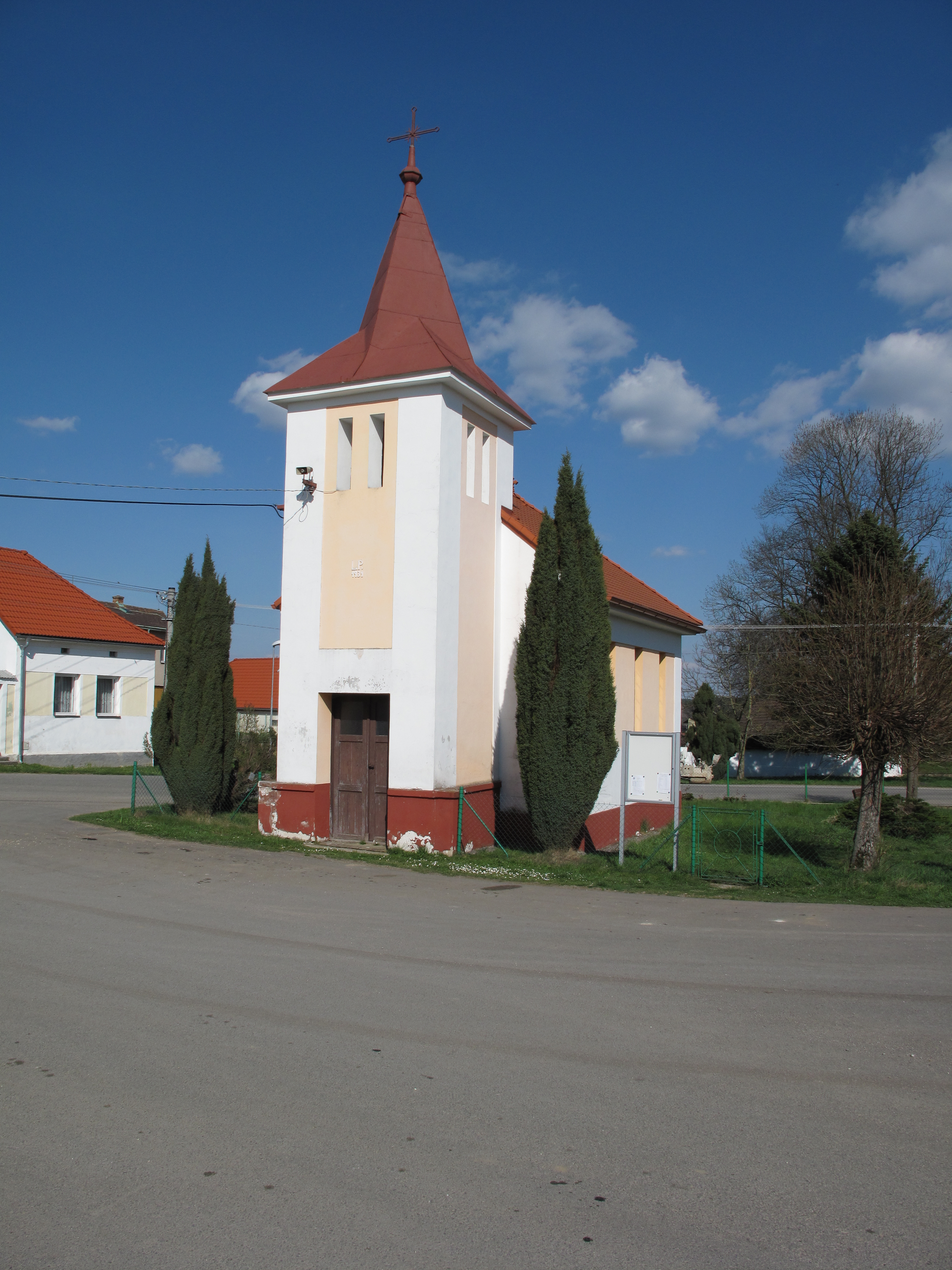 Kaplička ve Smilovicích. Okres České Budějovice, Česká republika.